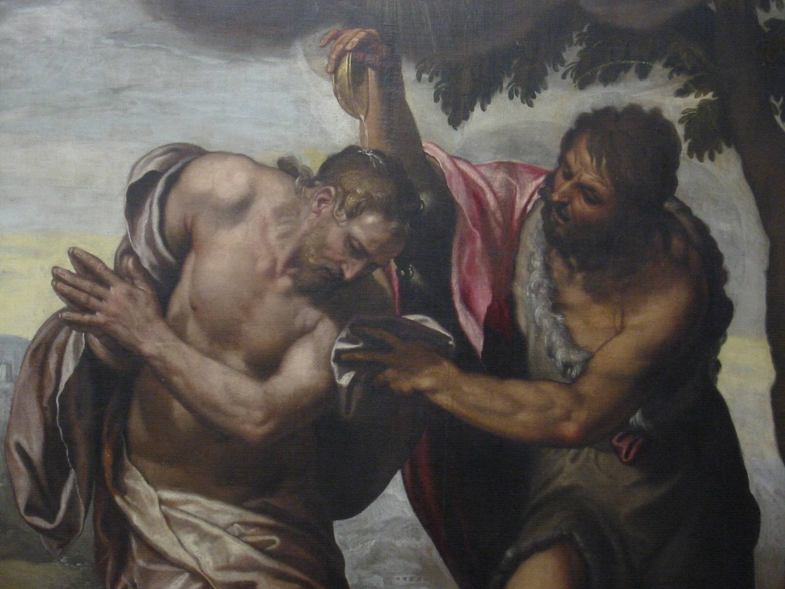 Bautismo de Cristo (detail)